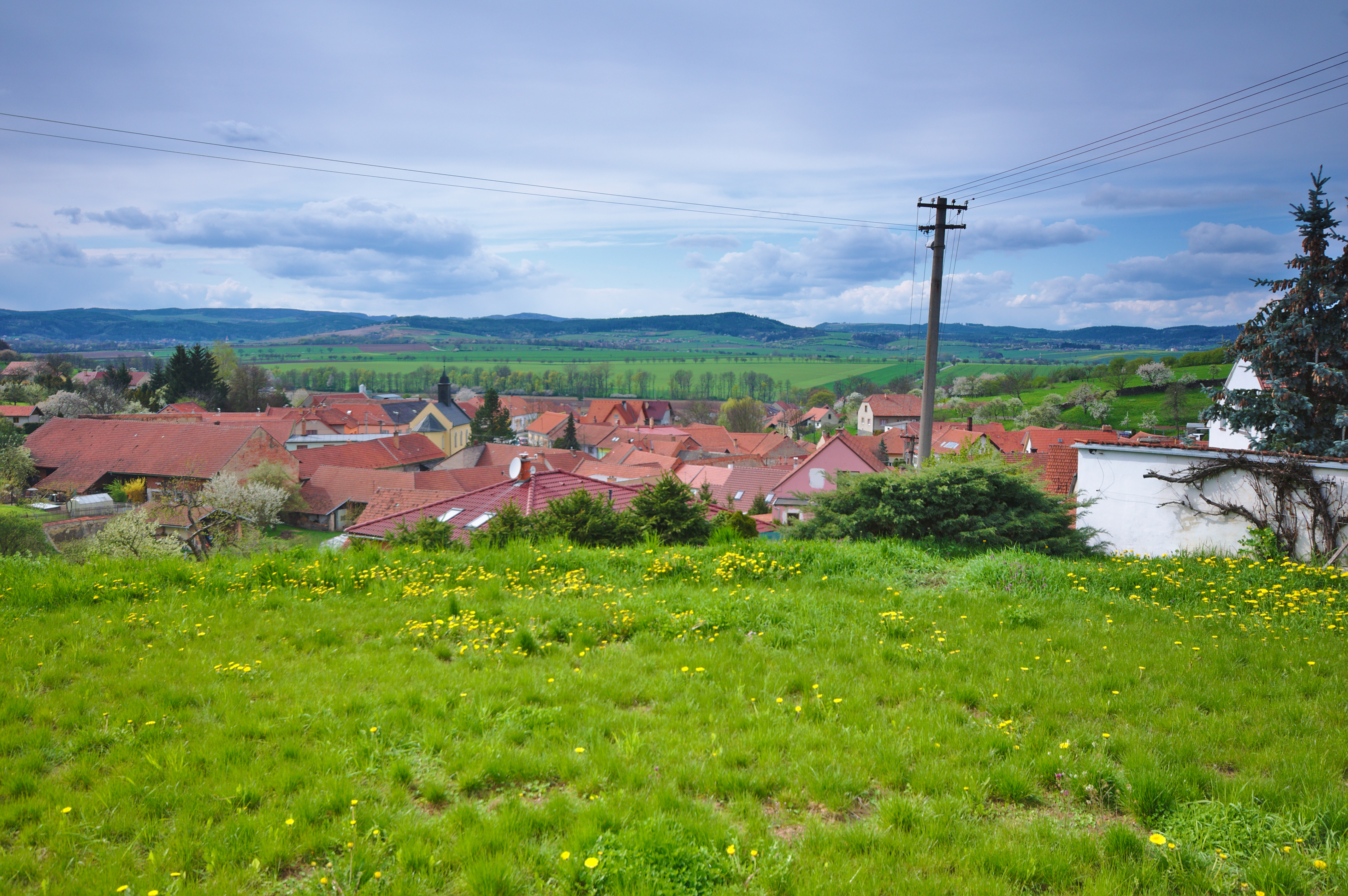 Obec od východu, Jabloňany, okres Blansko